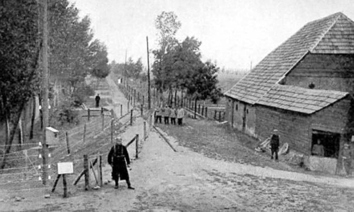 Das Grenzhochspannungshindernis an der belgisch-niederländischen Grenze 1915 - 1918